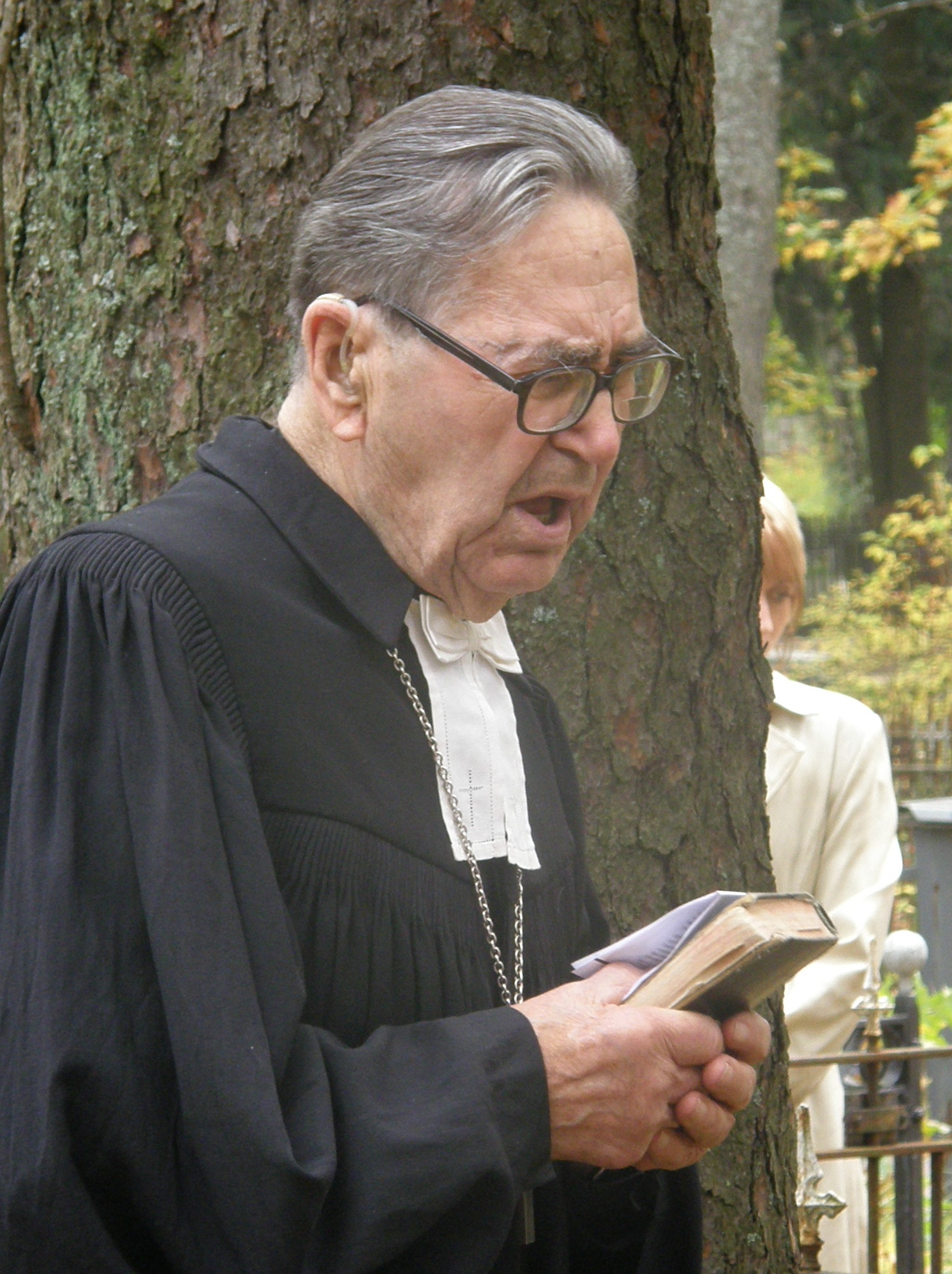 Paul Saar, kirikuõpetaja